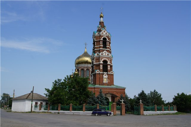 Спасо-Преображенский собор с приделами Константина и Елены и преподобного мученика Андрея: Обуховка, Азовский район, Ростовская область